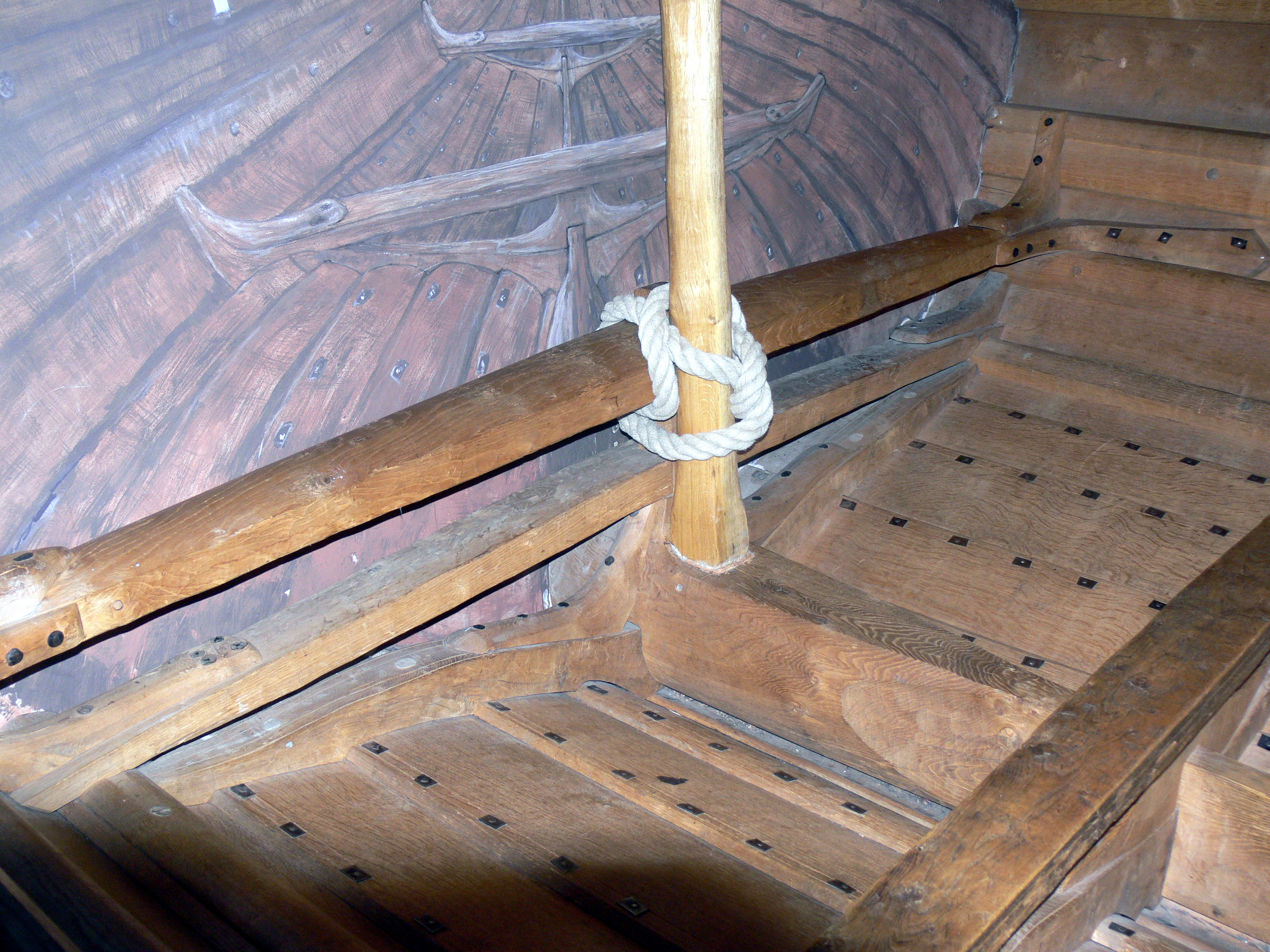 Frühskandinavisches Boot. Mastbefestigung